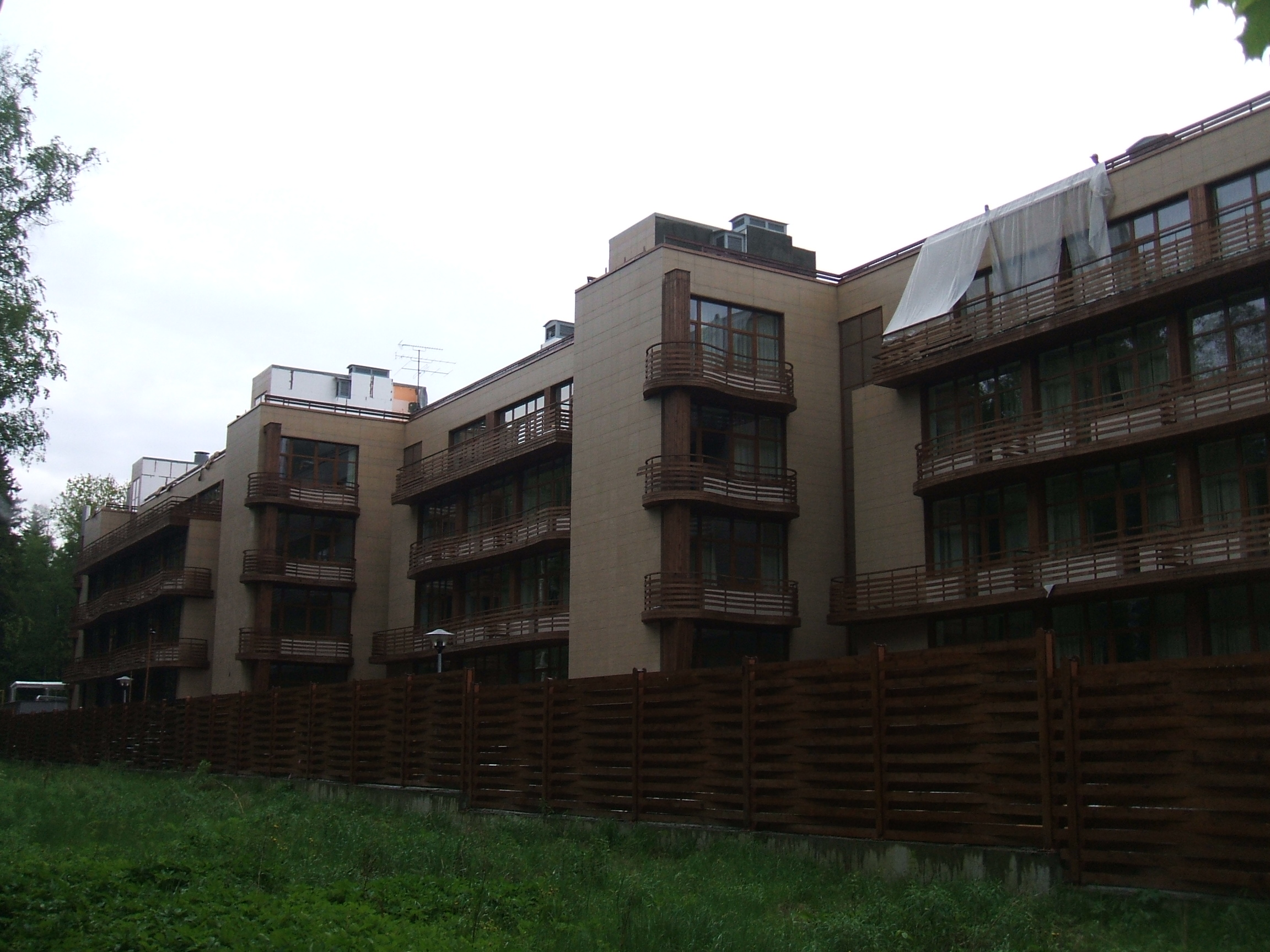 Новый пансионат в п. Репино СПб на ул. Луговой дом 10.